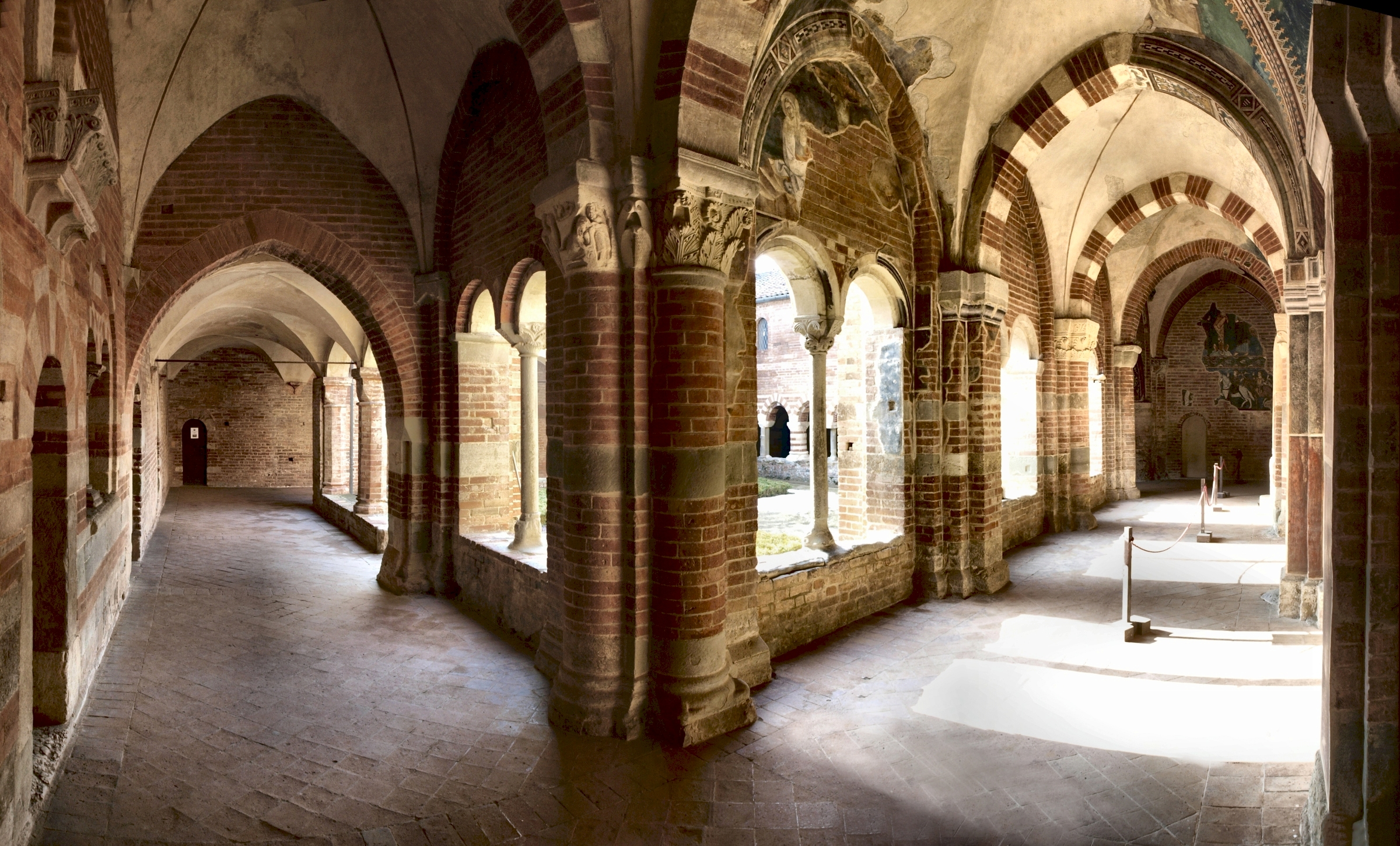 Abbazia di Santa Maria di Vezzolano This is a photo of a monument which is part of cultural heritage of Italy.